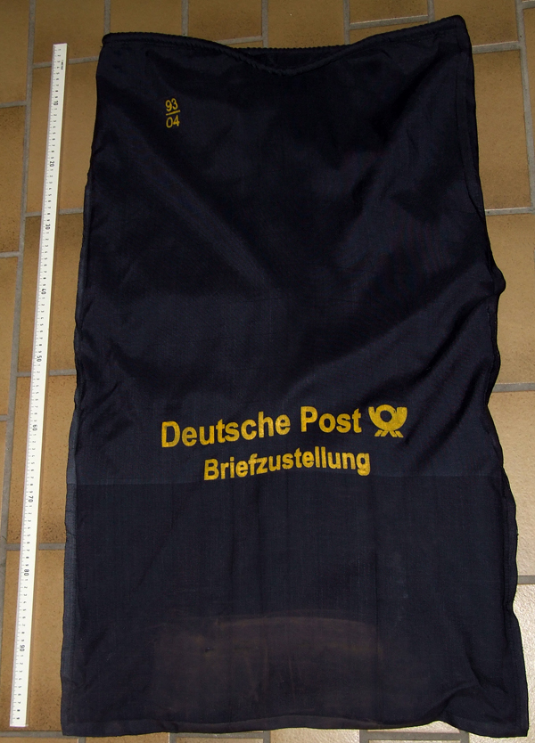 Postbeutel der Deutschen Post AG, in schwarz mit gelben Aufdruck "Briefzustellung"